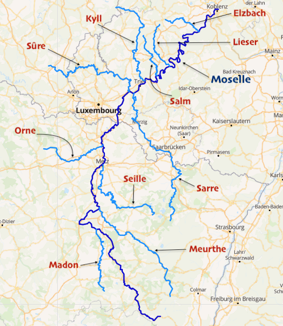 carte réalisée sur umap This map may be incomplete, and may contain errors. Don't rely solely on it for navigation.